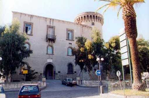 Castello di Caivano